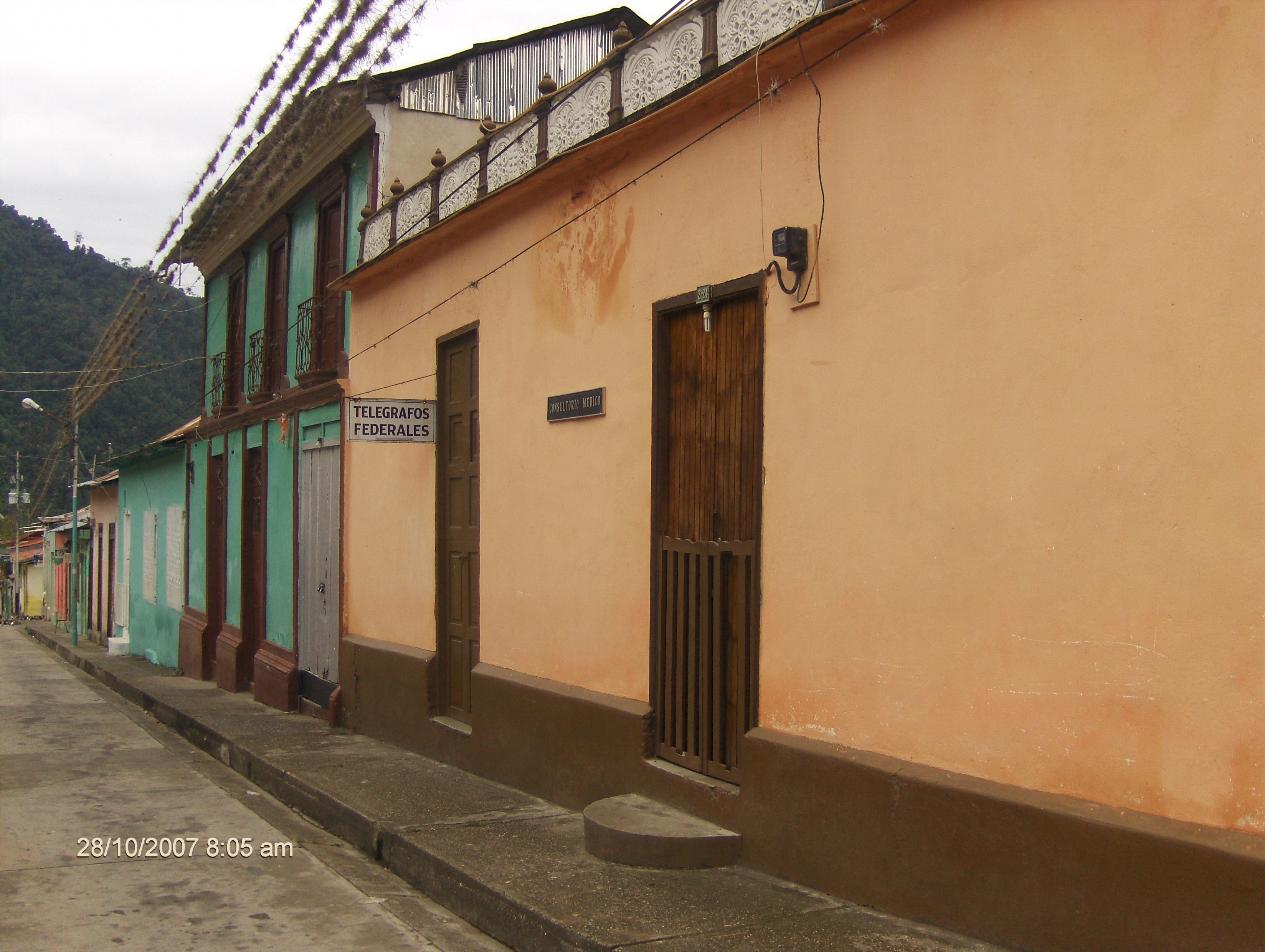 Telégrafos de Monte Carmelo.